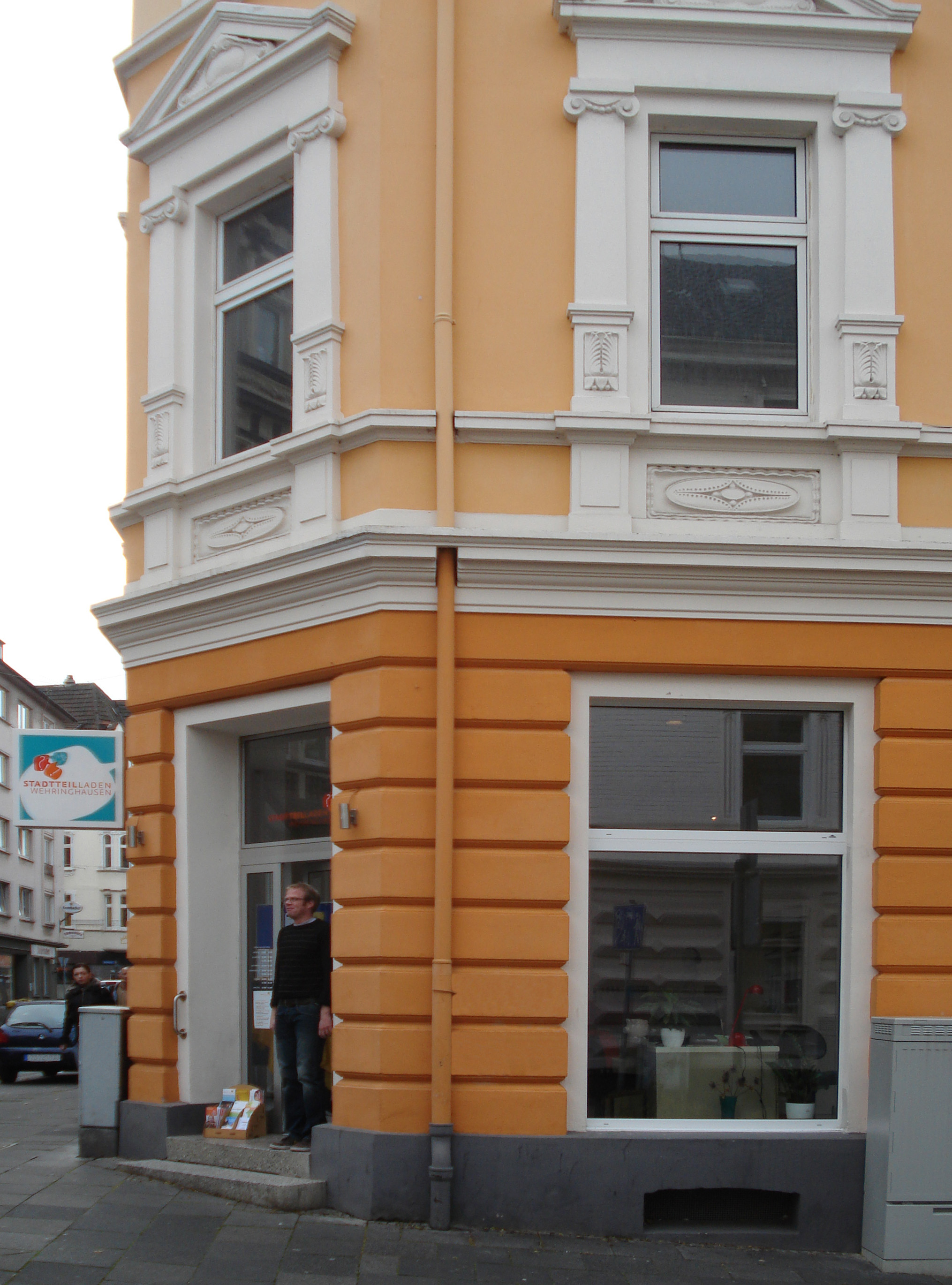 Lange Straße 22 in Hagen-Wehringhausen – in den Jahren 2010 und 2011 als „Stadtteilladen“ genutzt